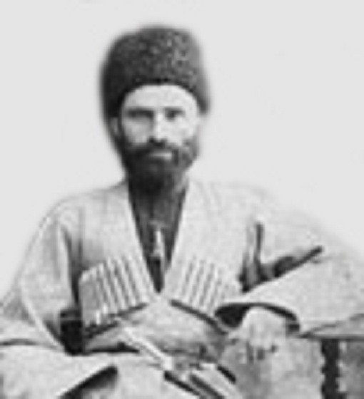 Мустафаев Абдул-Басир хаджи — (1865—1932) известный учёный арабист, религиозный и общественно-политический деятель начала XX века. в 1919 году назначен Шейх-уль исламом Дагестана, председатель Шариатского суда.